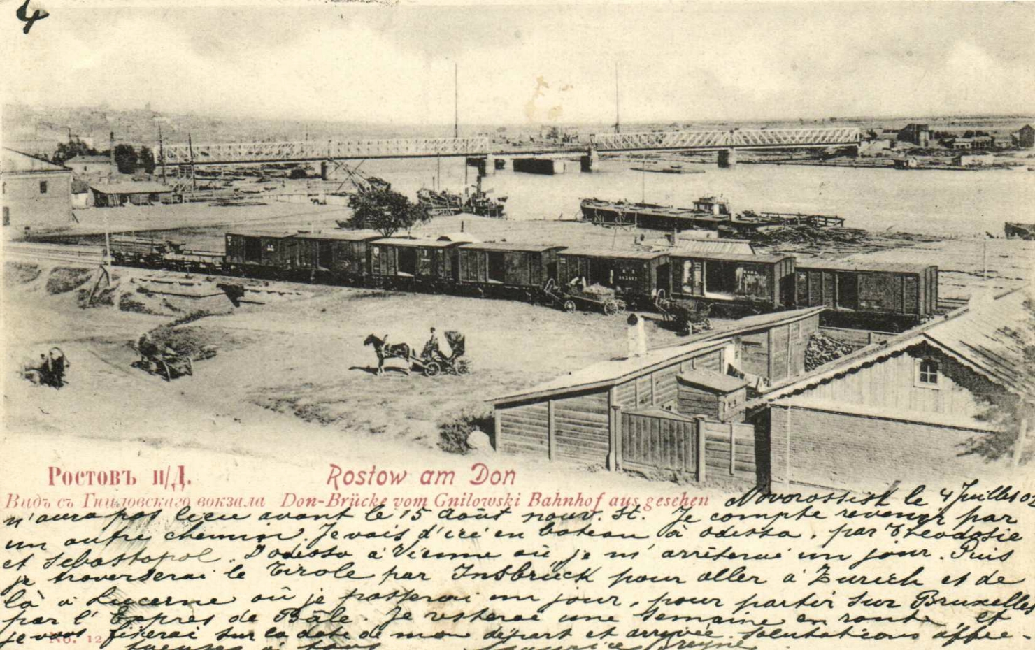 Ростов-на-Дону до Октябрьской революции. Вид с Гниловского вокзала.